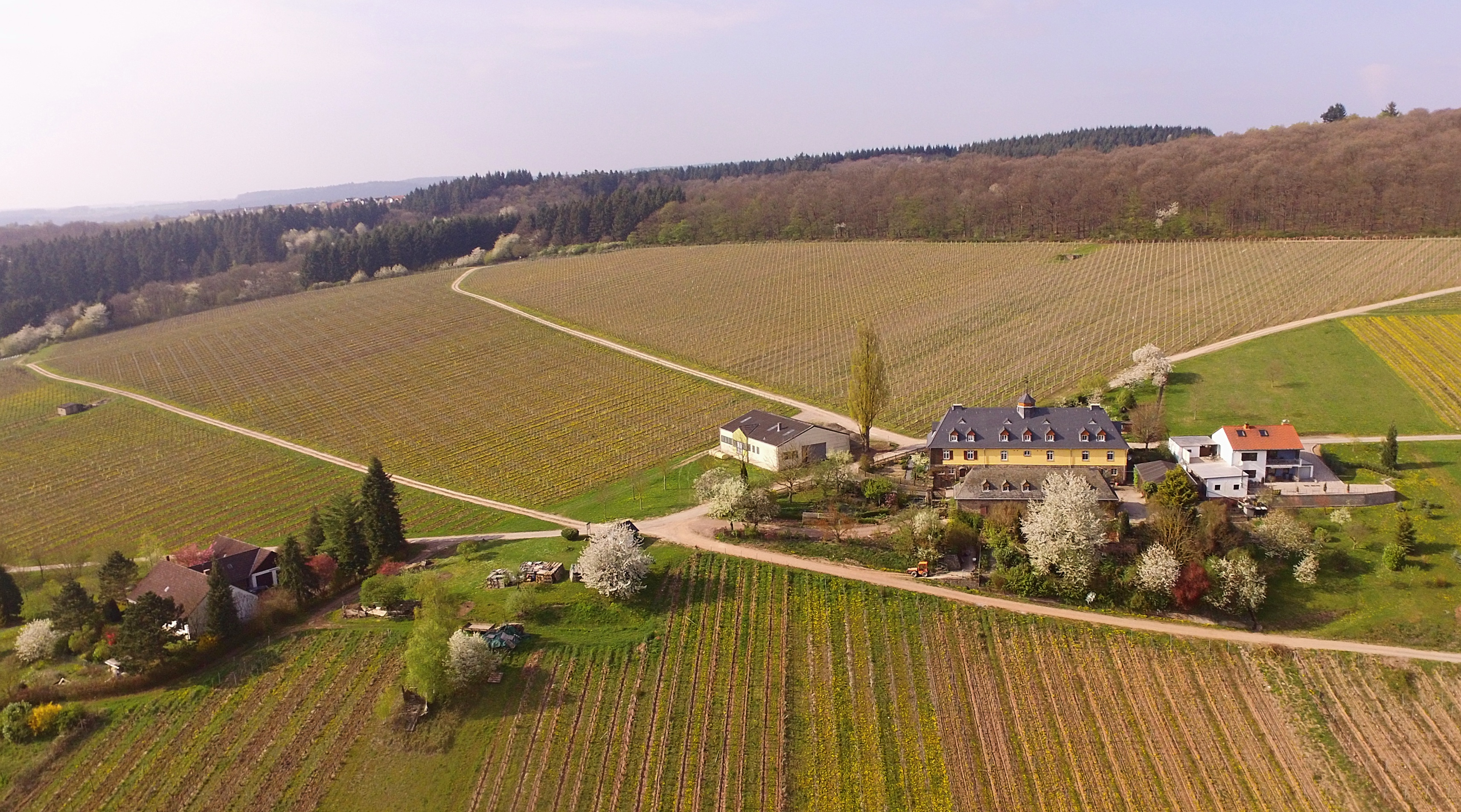 Weingut Falkensteinerhof in der Weinlage Falkensteiner Hofberg - Konz-Niedermennig